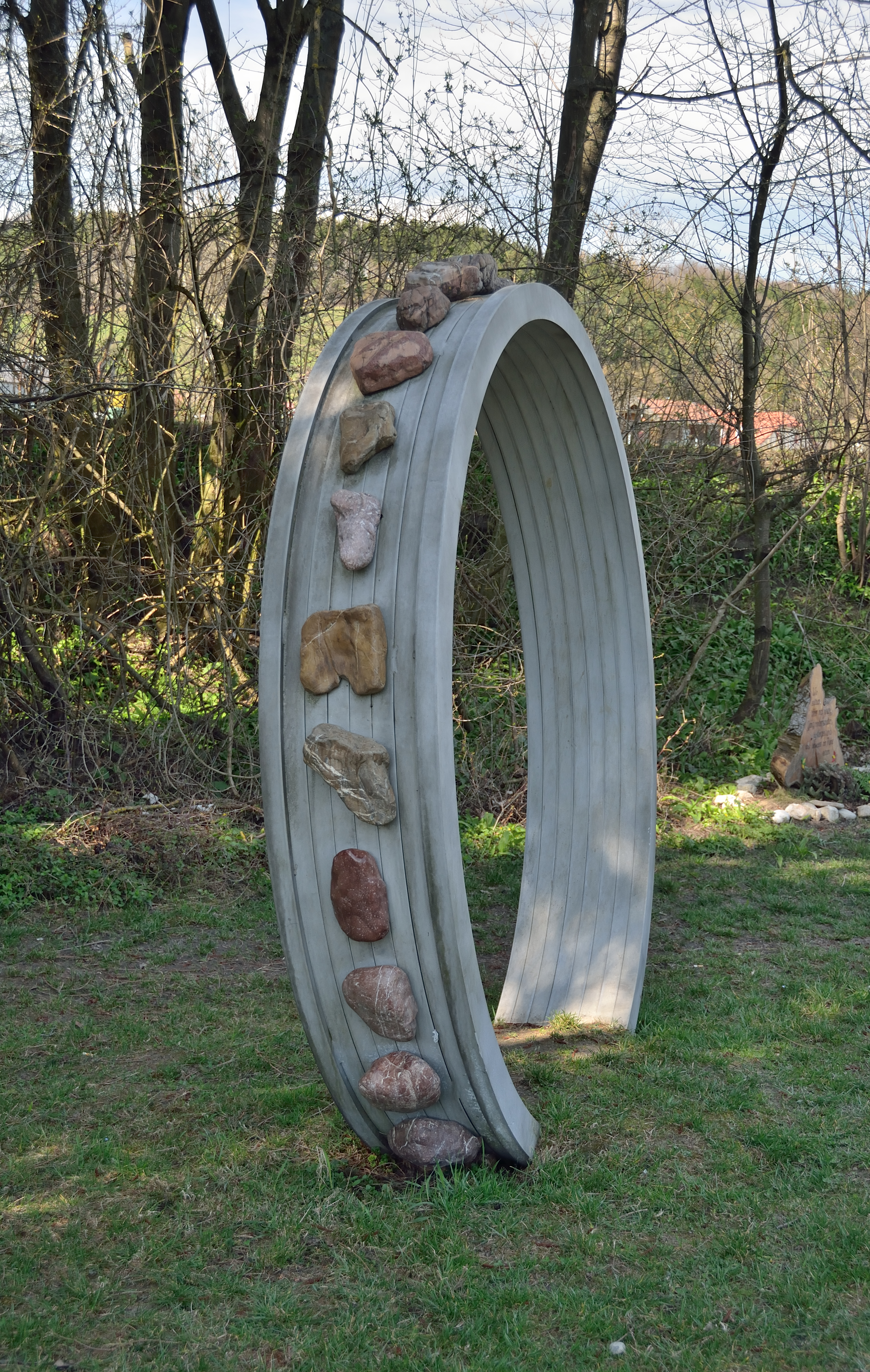 Landschaft im Wandel Morgengabe an Gaia, my sweet_hart von Egon Straszer aus dem Jahr 2009 in Weinburg, Niederösterreich. Aluminium / Fluß-edel-steine.